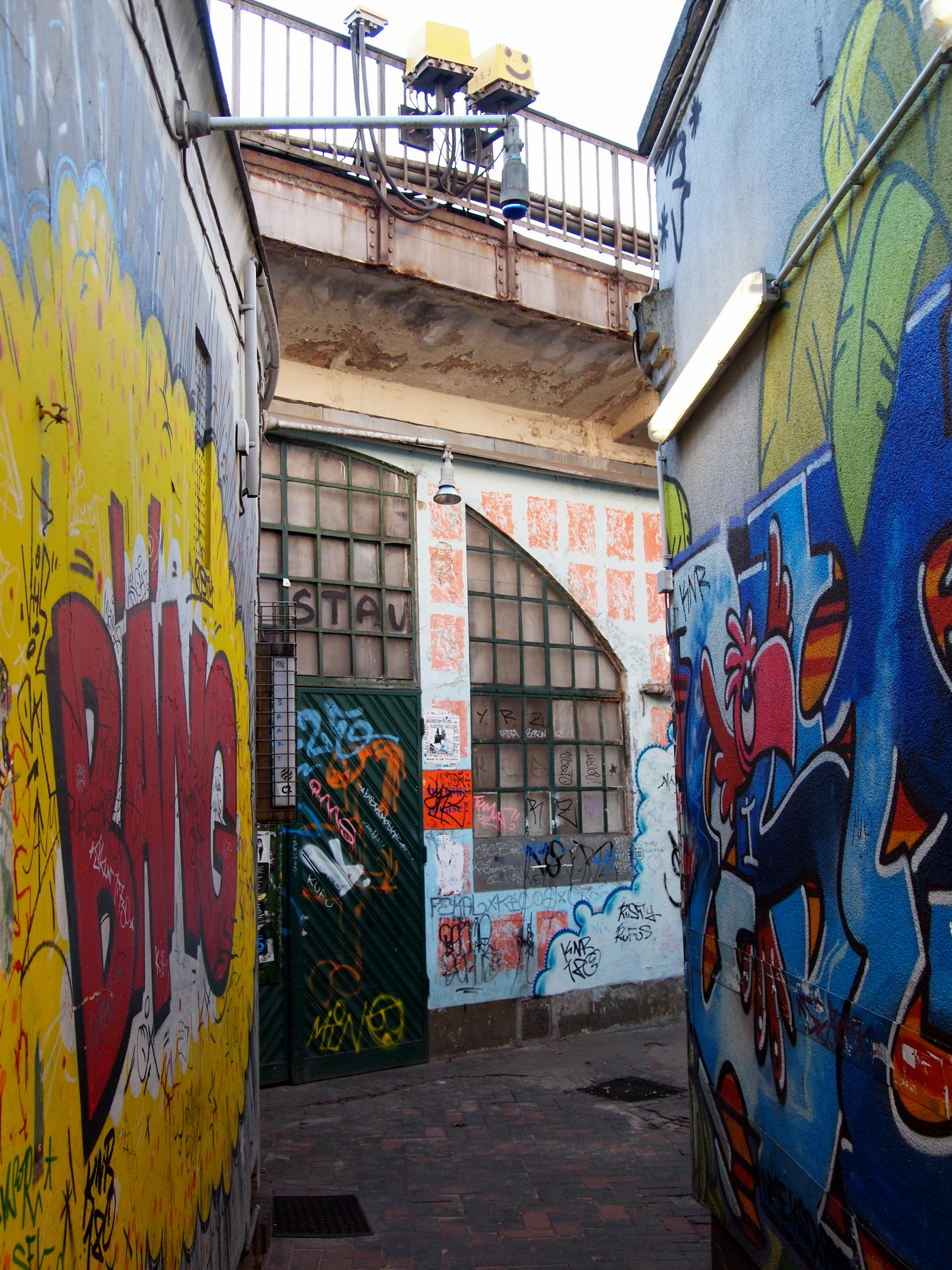 Sternbrücke Hamburg Altona Altstadt - Stresemannstraße / Max-Brauer-Allee; hier: Kasematten hinter dem Brückenlager